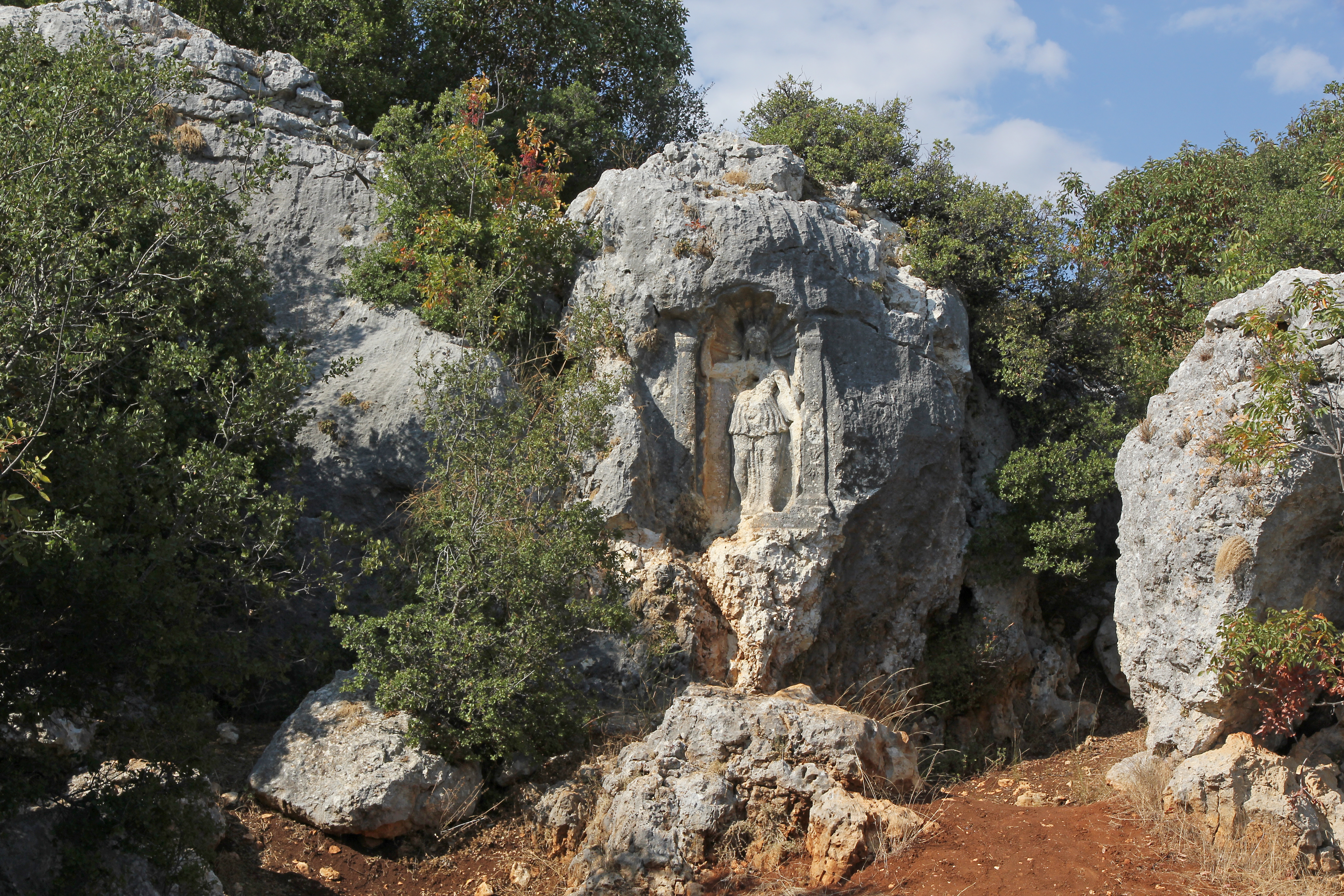 Athena-Relief bei Sömek, Südtürkei